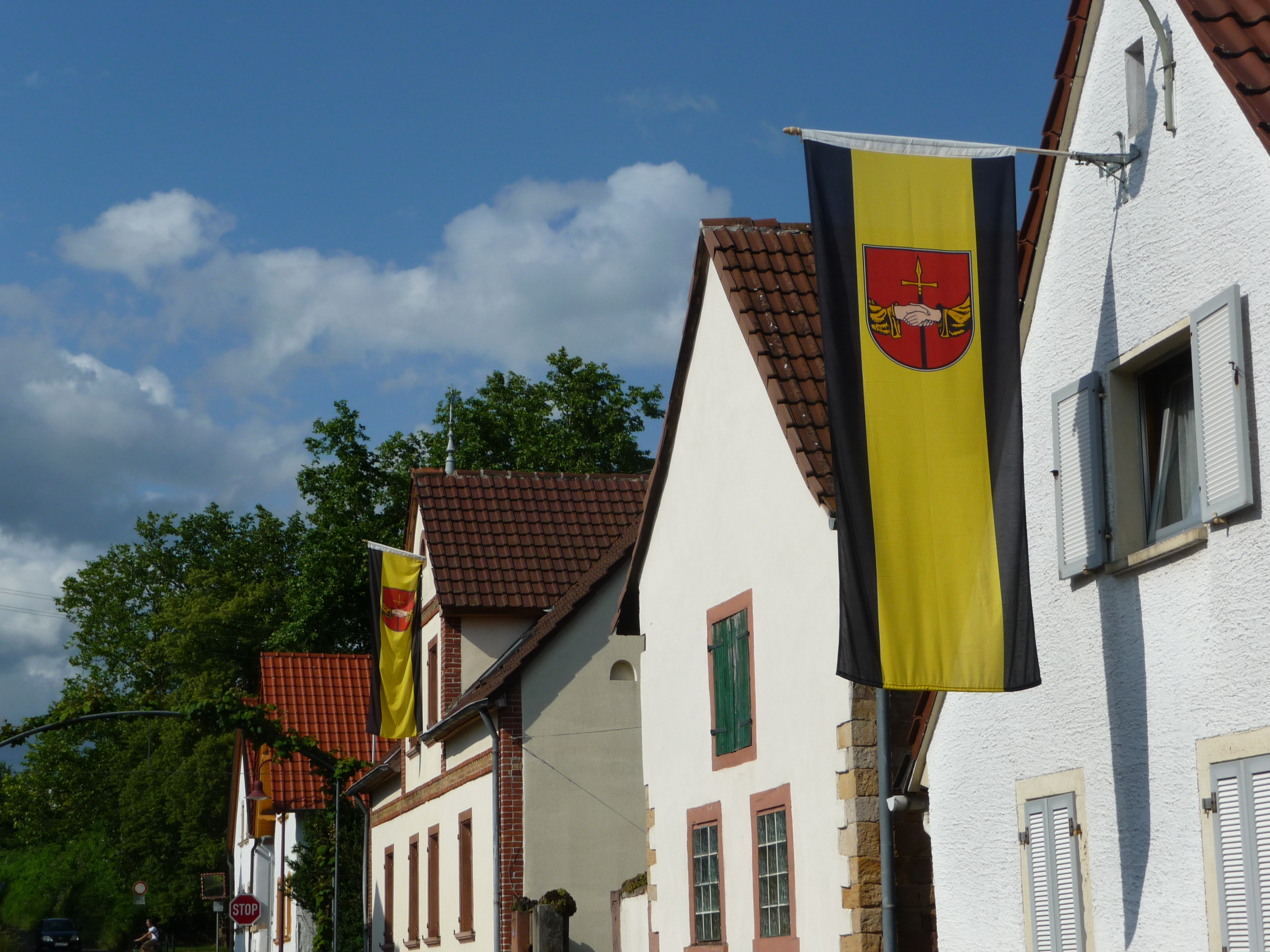 Hauptstraße in Knöringen. Knöringen ist eine Ortsgemeinde im Landkreis Südliche Weinstraße in Rheinland-Pfalz.